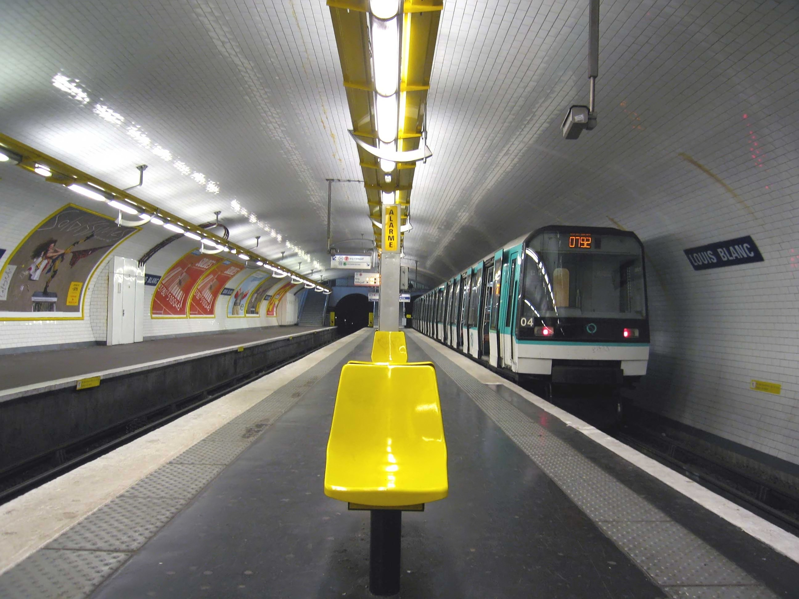 Description : Rame MF88 à la Station Louis Blanc Place : Paris, France Date : Juillet 2006 Auteur : Pline photo personnelle